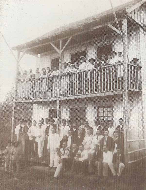 Inmigrantes alemanes en una casa de dos pisos en Hohenau, Itapúa, Paraguay.